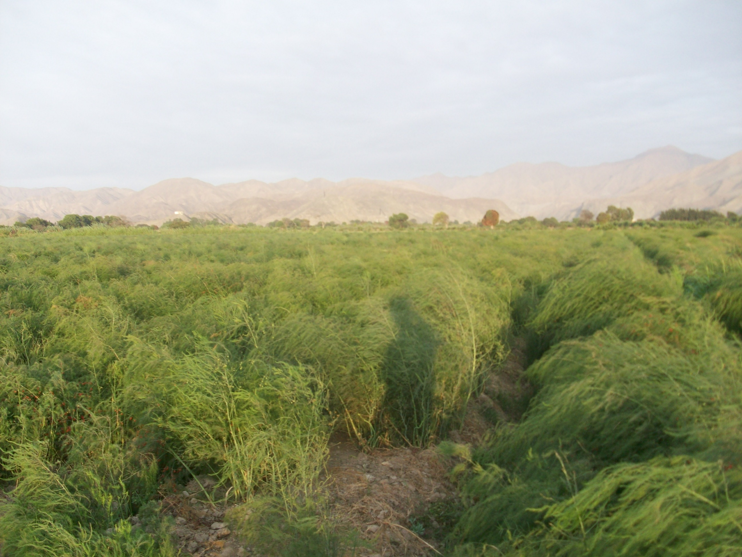 Granja o chacra de espárragos en el valle de Huarmey, Ancash, Perú.